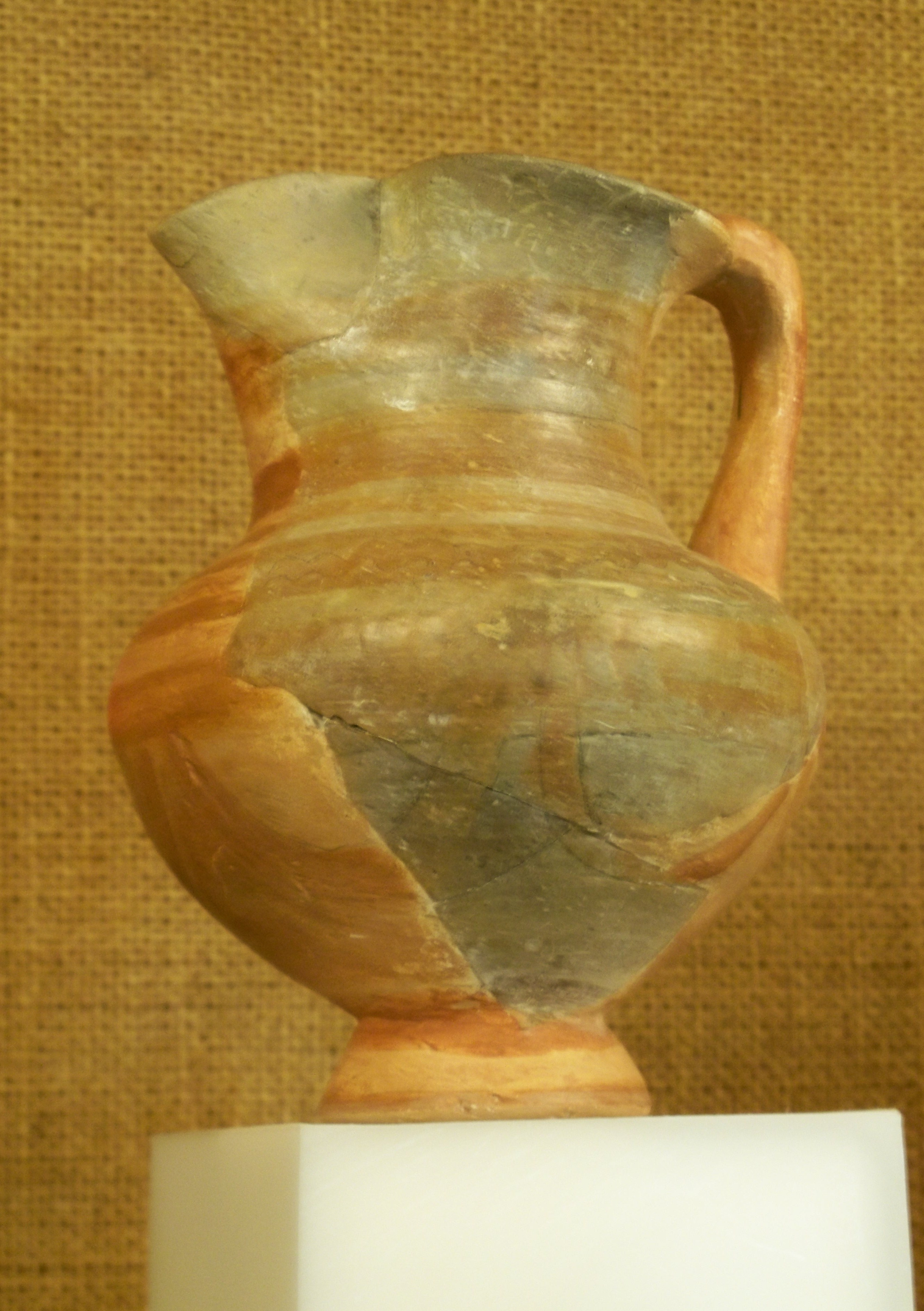 oenoché au musée du Pègue, Drôme, France